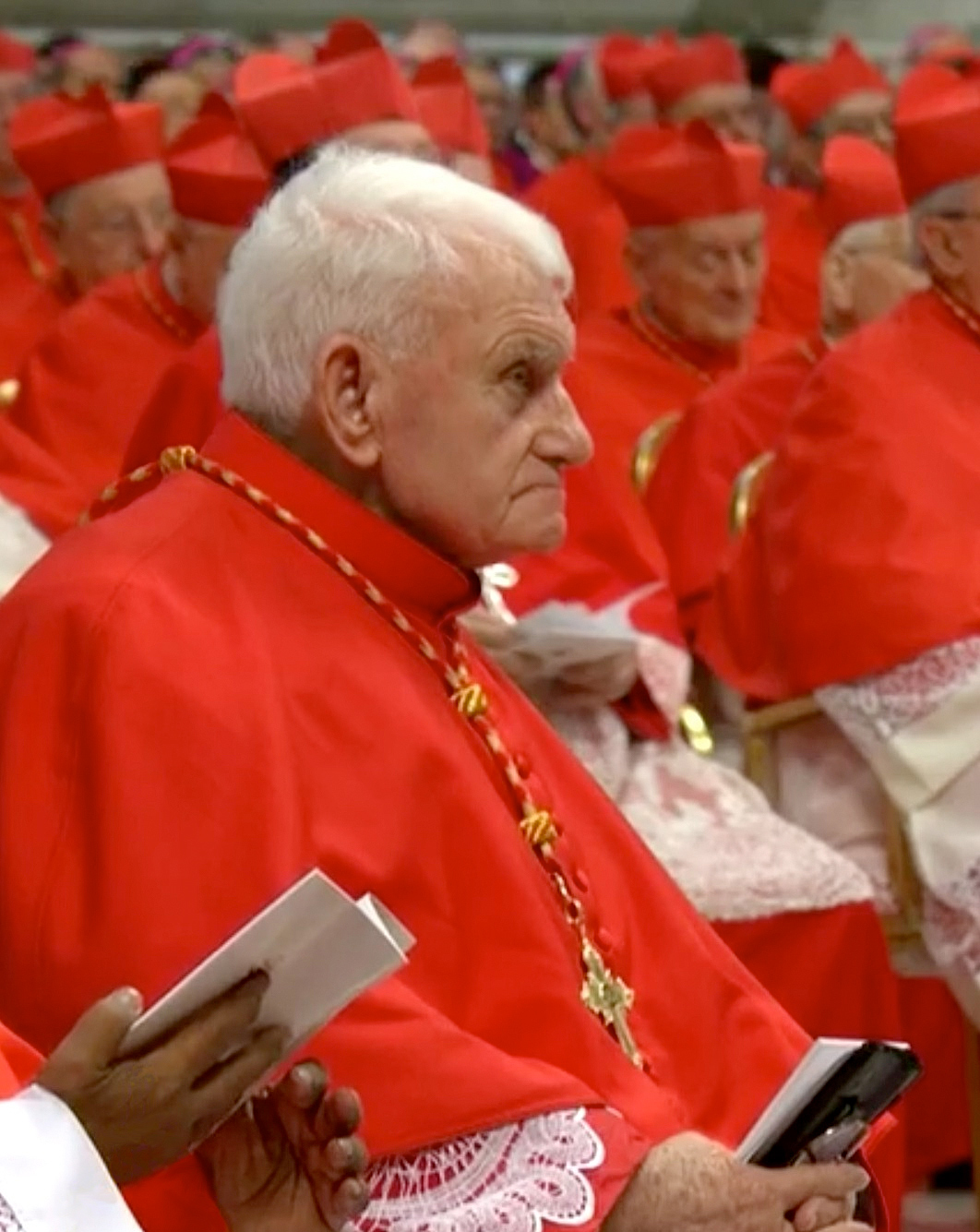 Le père Ernest Simoni au cours du consistoire ordinaire public du 19 novembre 2016, le créant cardinal de la Saint Église Romaine, avec la diaconie de Santa Maria della Scala.